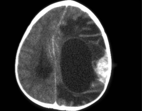 radiologic appearance of desmoplastic infantile ganglioglioma